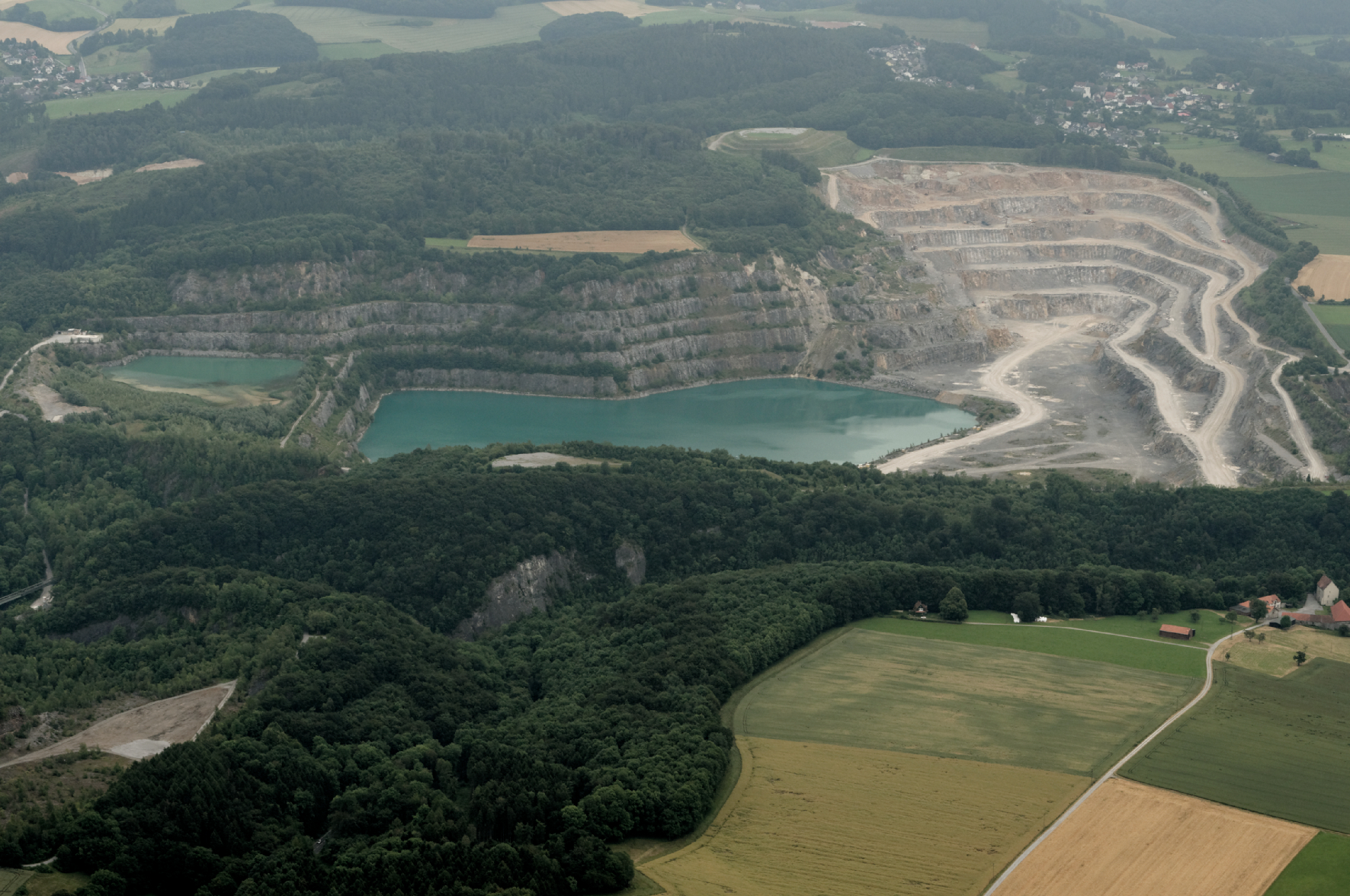 Fotoflug Sauerland Nord. Menden (Sauerland): Steinbruch Oberrödinghausen der Fa. Rheinkalk, Naturschutzgebiet Hönnetal, rechts Burg Klusenstein, hinten links Asbeck, hinten rechts Eisborn, Blickrichtung Ost The making of this document was supported by the Community-Budget of Wikimedia Germany.